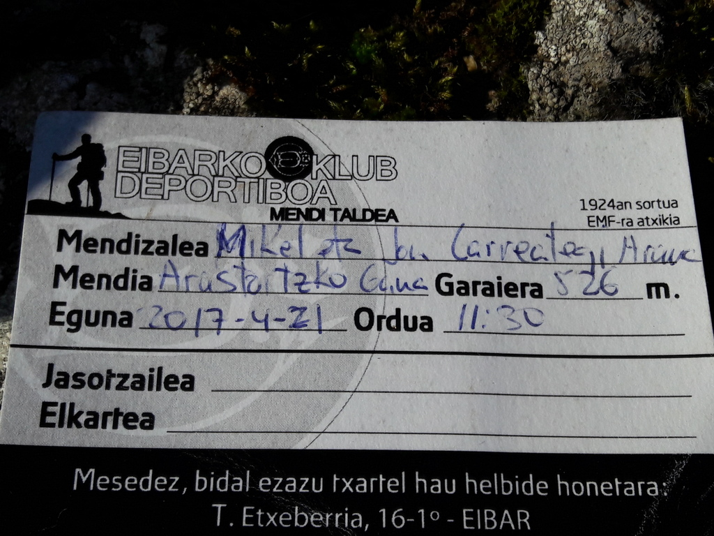 Eibarko Klub Deportiboko txartel bat, mendiko buzoi batean utzitakoa.